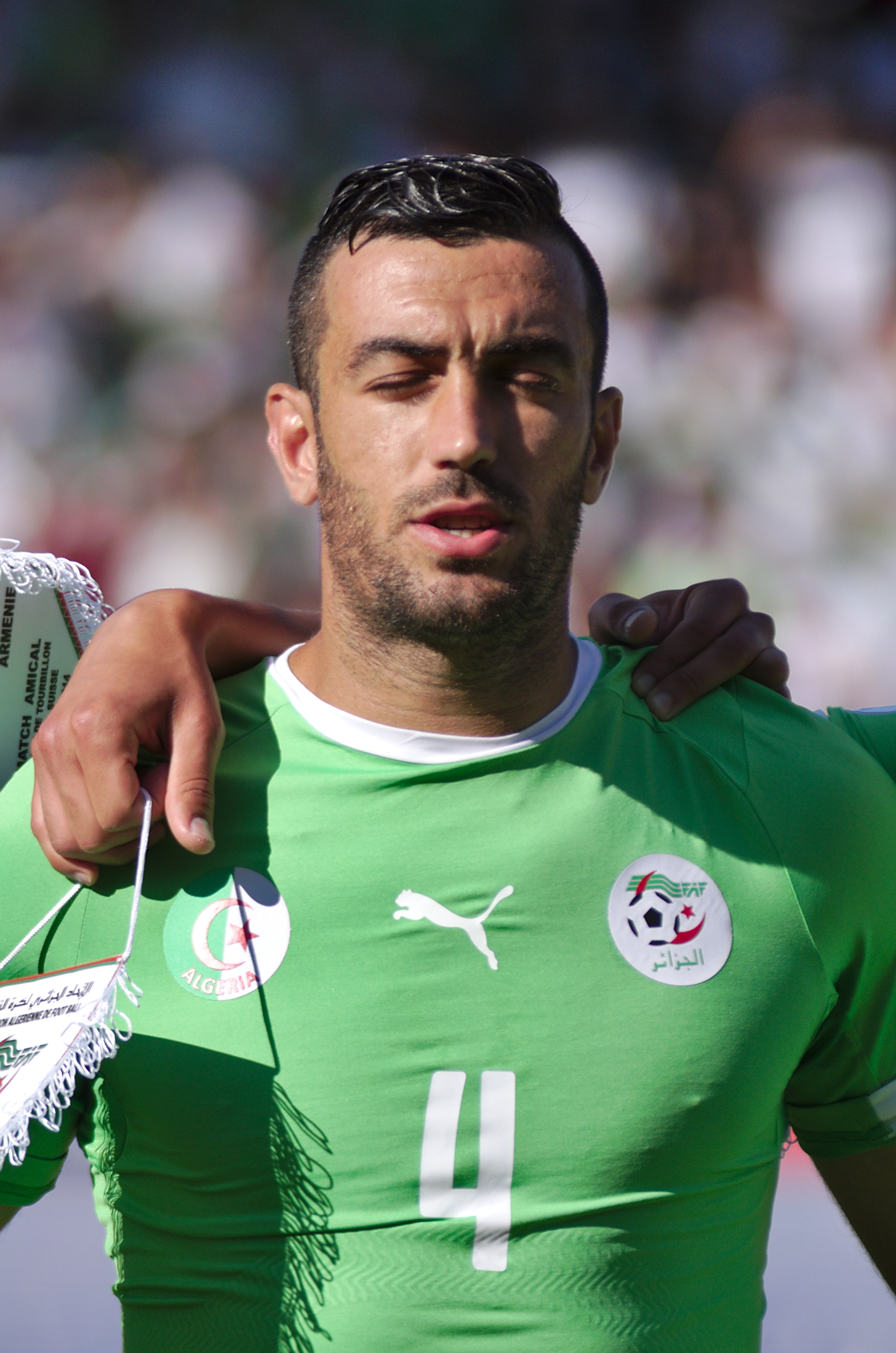 Algérie - Arménie - 20140531 - Essaid Belkalem